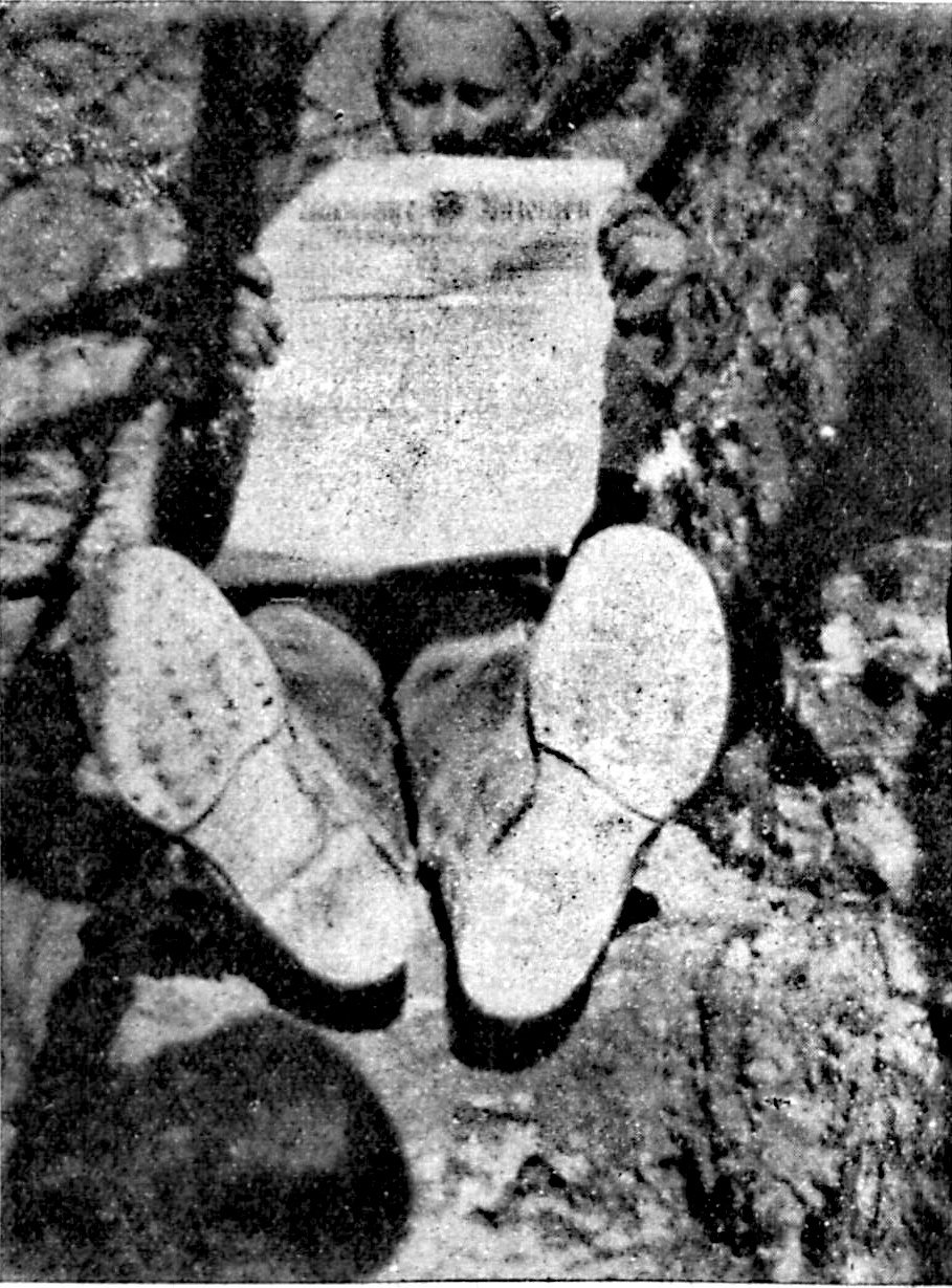 Aus dem Felde: Photographischer Witz unserer (IR162) Feldgrauen